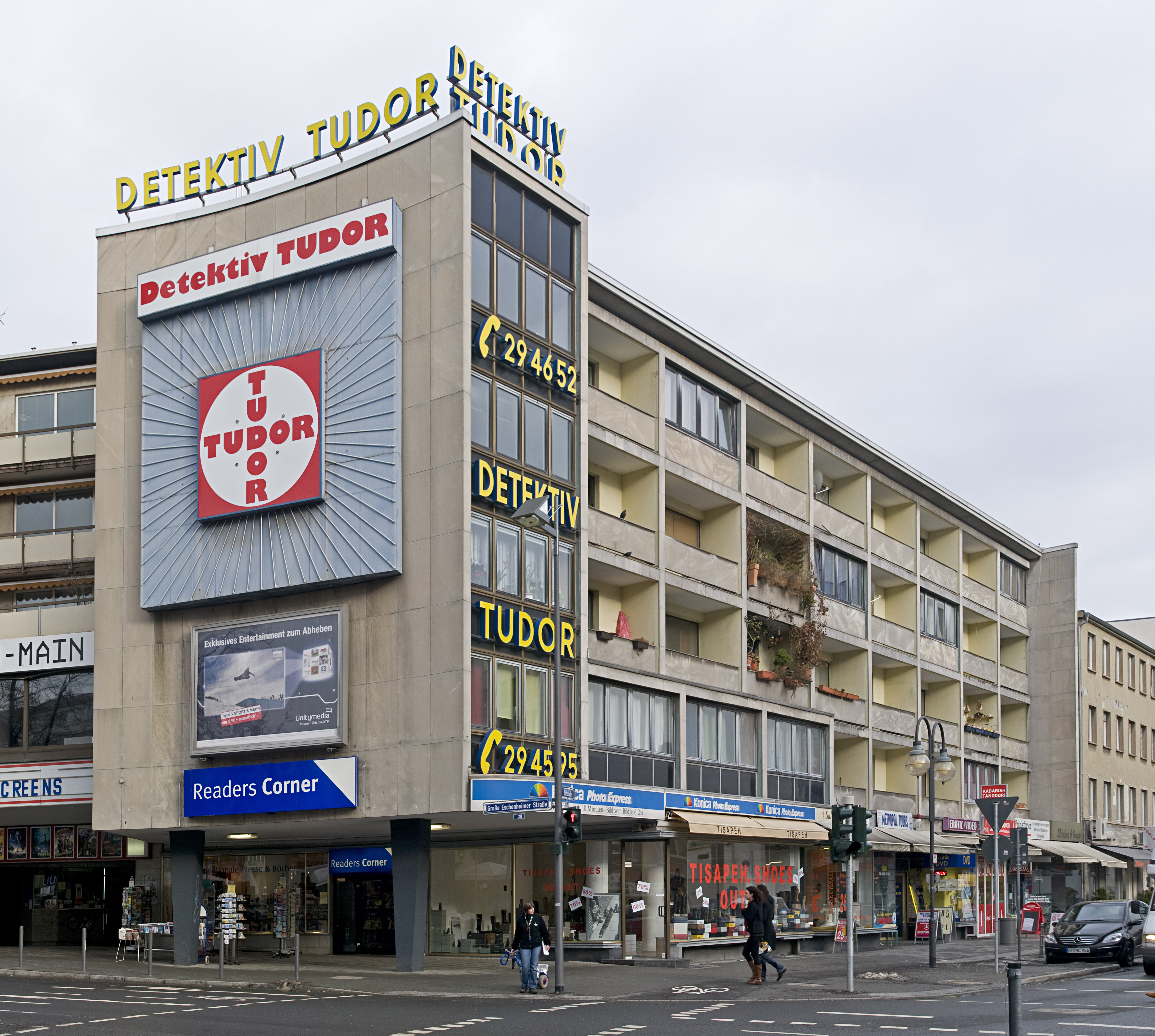 Appartementhaus Stiftstraße 36 in Frankfurt am Main